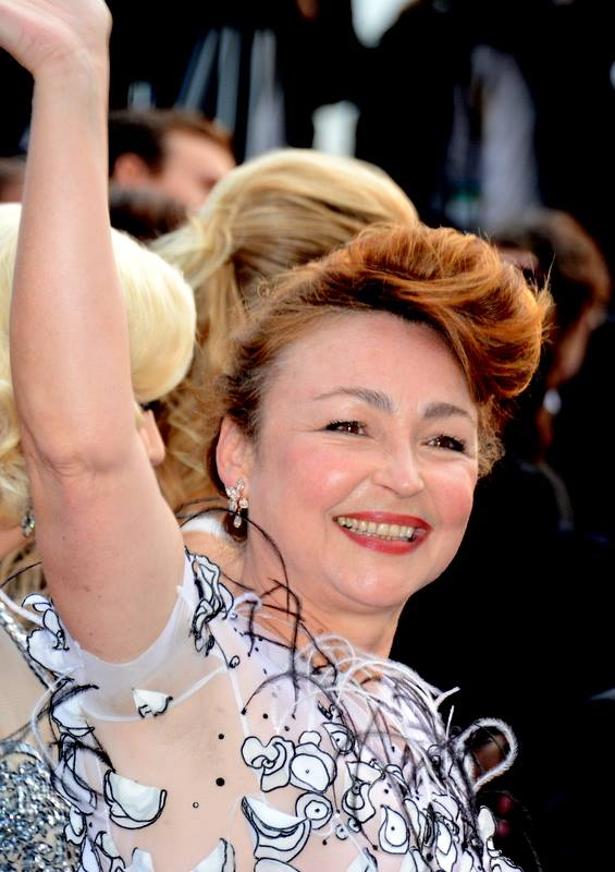 Catherine Frot au festival de Cannes